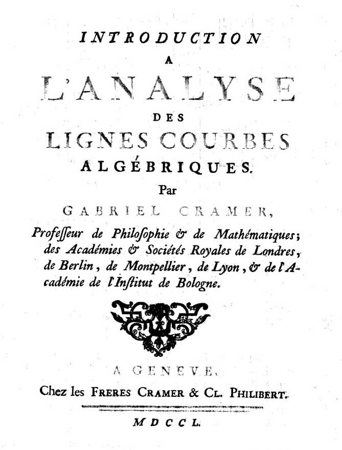 Introduction a l'analyse des lignes courbes algebriques. Par Gabriel Cramer .... - A Geneve : chez les freres Cramer & Cl. Philibert, 1750. - XXIII, [1], 680, XI, [1] P., XXXIII, [1] c. di tav. ripiegata : ill. ; 4º .